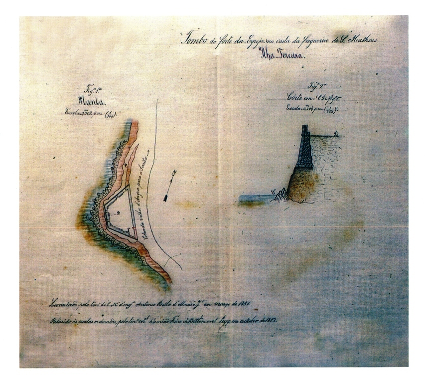 "Tombo do forte da Egreja, na costa da freguezia de S. Matheus". Ilha Terceira (Açores), Portugal.